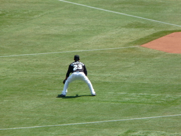 José Bautista 19:15, 6 September 2008 . . DinoZon . . 360×270 (49 KB)